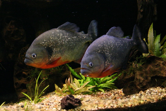 deux pygocentrus caribes d'environ 25/30 centimètres faisant parti d'un groupe de cinq individus dans un aquarium de 700 litres